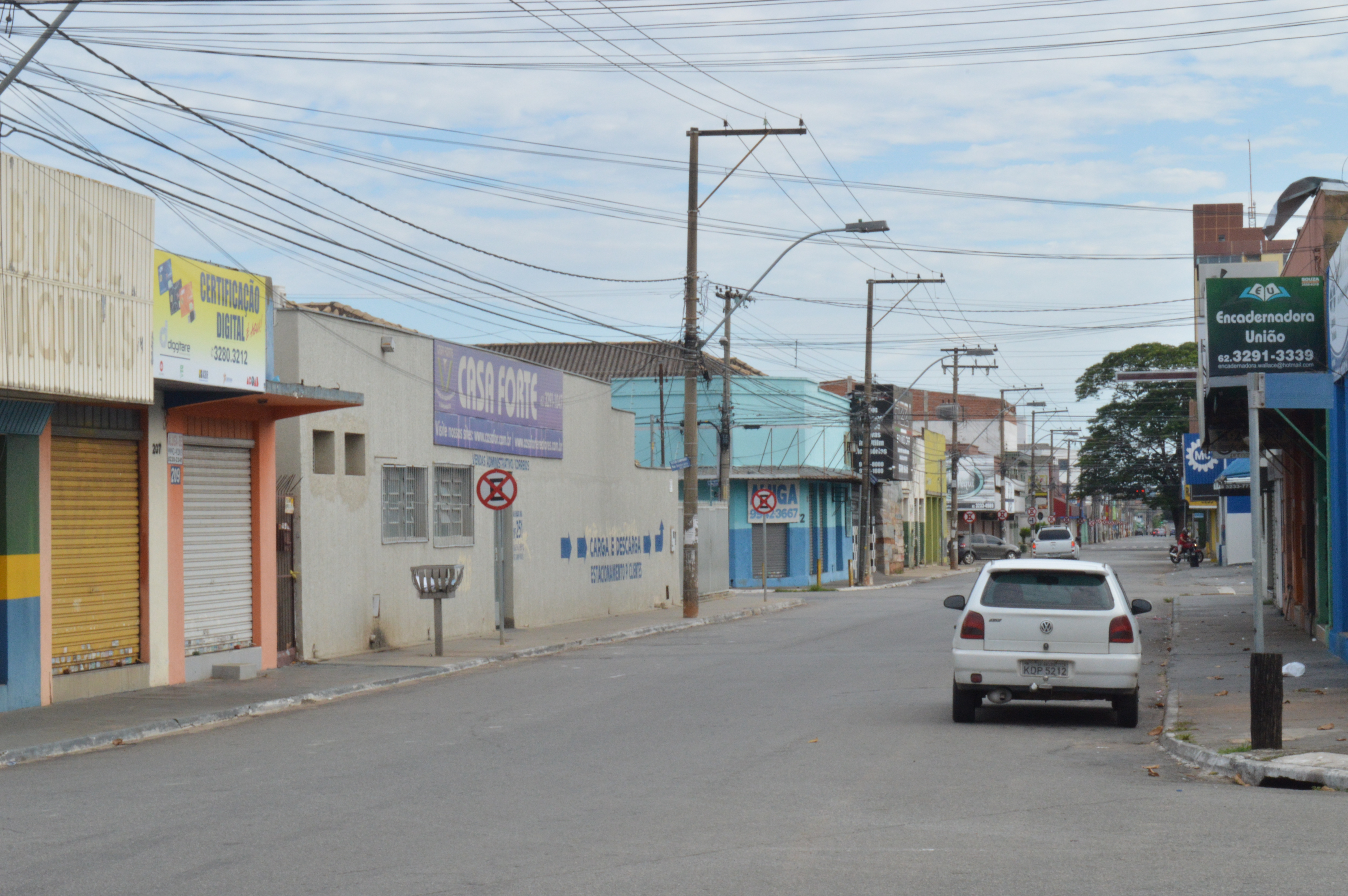 Vista da Rua Senador Jaime em Goiânia, no bairro Campinas. Foto de outubro de 2016.